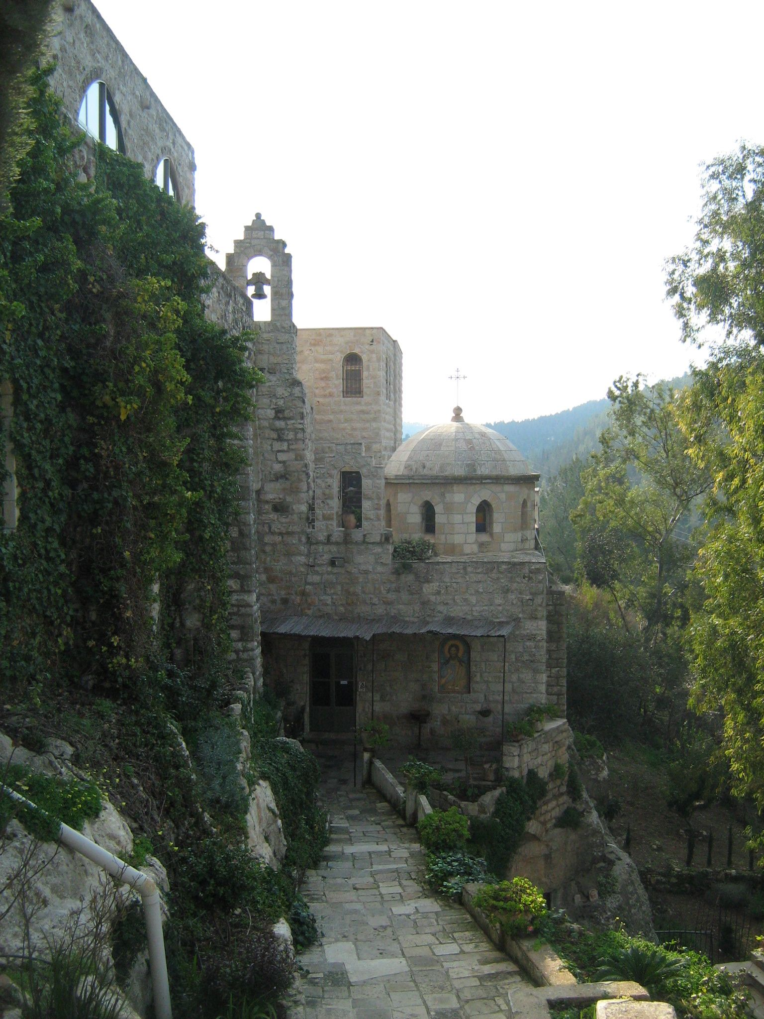 מנזר יוחנן במדבר